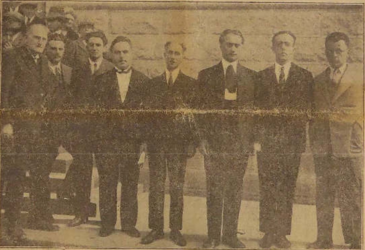 Photo publiée dans Breiz Atao du 2 septembre 1928, et prise lors du congrès de Châteaulin du parti autonomiste breton. De droite à gauche : Paul Schall, Olier Mordrel, C.Dalhet, Maurice Duhamel, Petru Rocca, François Debeauvais, (Wurth), Pasquale Manfredi